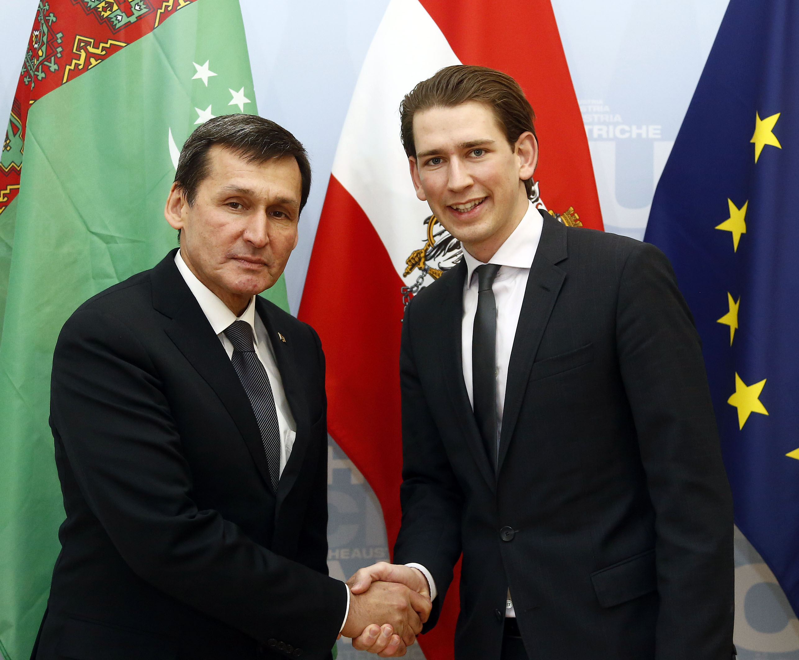 Außenminister Sebastian Kurz empfängt seinen turkmenischen Amtskollegen Rasit Meredowin in Wien. 28.02.2014, Foto: Dragan Tatic